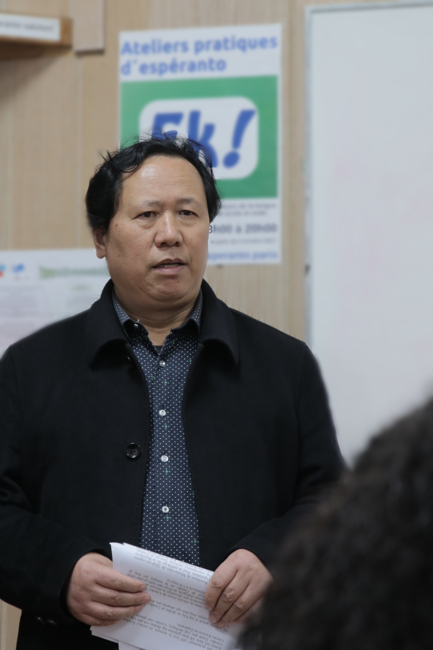 Trezoro Huang Yinbao prelegas pri la Unesko-Kuriero en Esperanto kaj pri la retejo de Unesko kadre de la 41-a AMO-seminario en la sidejo de Espéranto-France